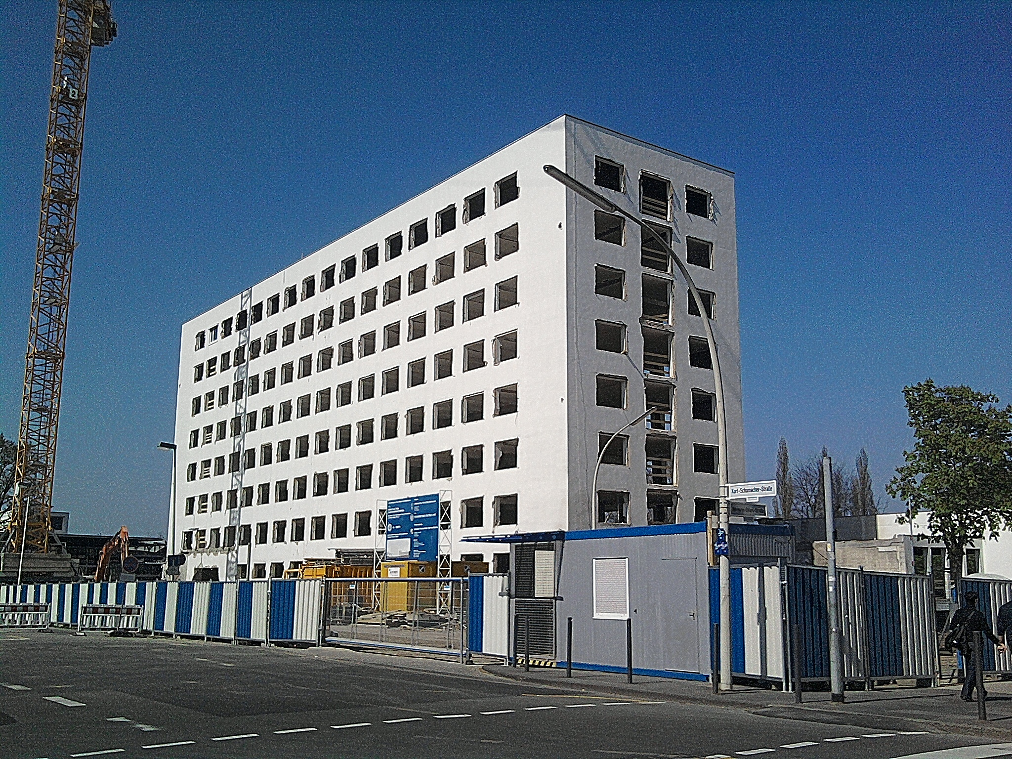 Altes Abgeordnetenhochhaus, Platz der Vereinten Nationen 1, Bonn-Gronau: Umbau- und Modernisierungsarbeiten